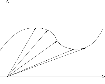 Parameterkurve (et specialtilfælde af en vektorfunktion med kun én parameter)